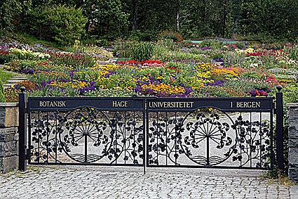 Tidligere inngangsparti for Botanisk hage i Bergen, flyttet/ endret sommeren 2018. Den 21. august 1996, ble Botanisk hage innviet. Besøksadresse: Skipanesvegen 45, 5259 Hjellestad